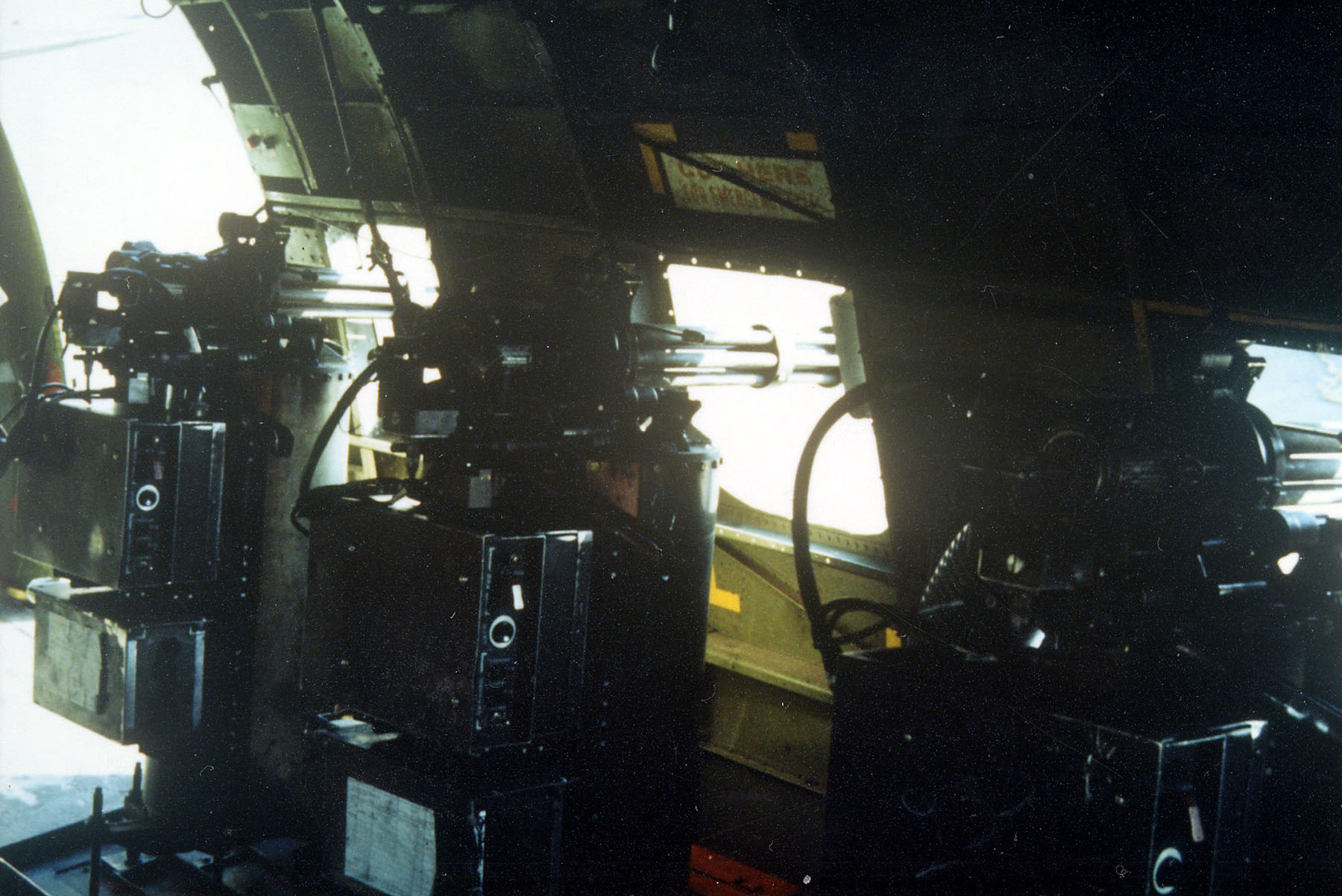 GE 7.62mm MXU-470A Miniguns in Douglas AC-47D